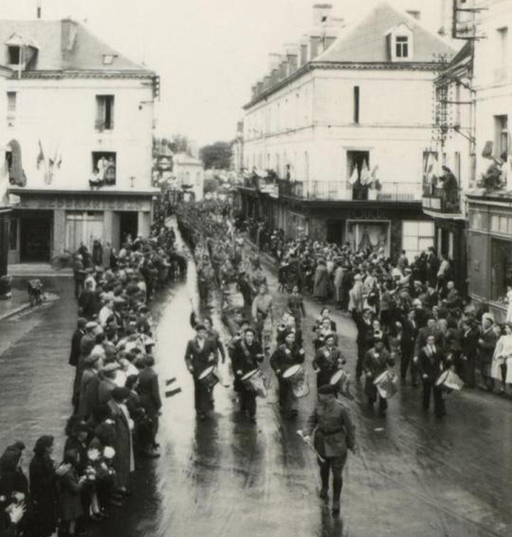 Défilé du 32 RI (maquis d'Eperon) à Loches le 6 septembre 1944